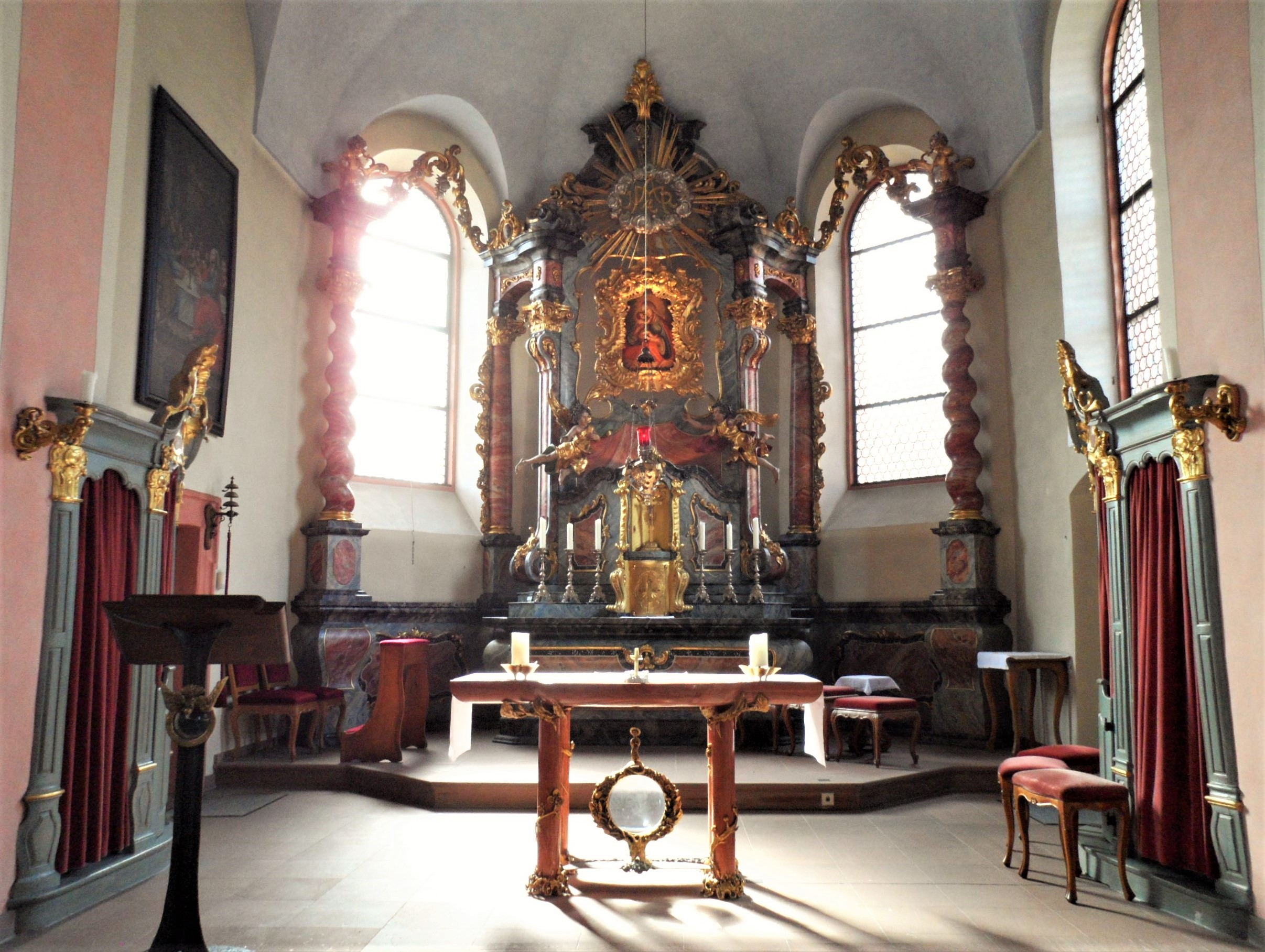 Die barocke Kirche "Maria Hilf" in Moosbronn (Ortsteil von Gaggenau) wurde 1749 geweiht